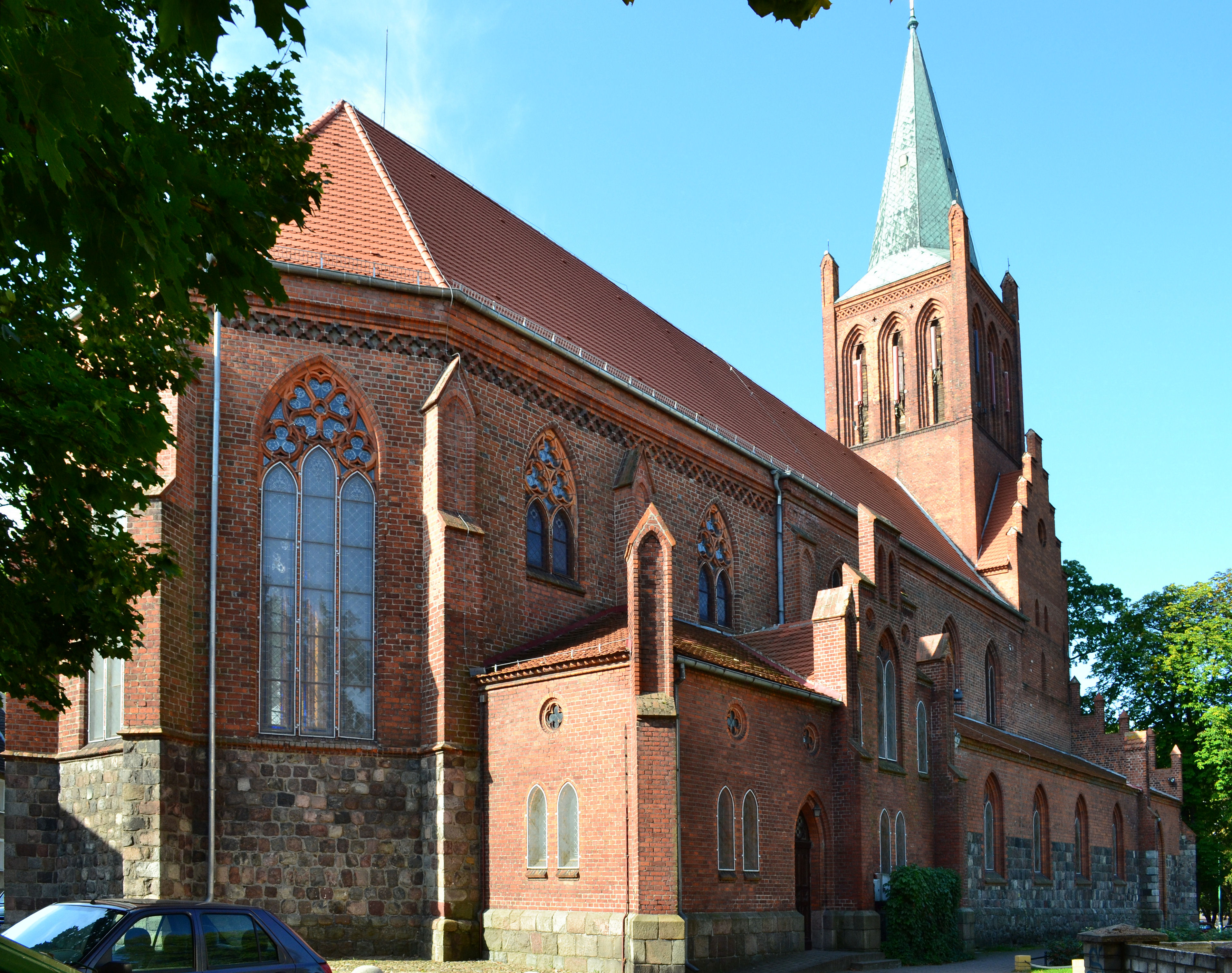 Kosciol Niepokalanego Serca NMP w Barlinku